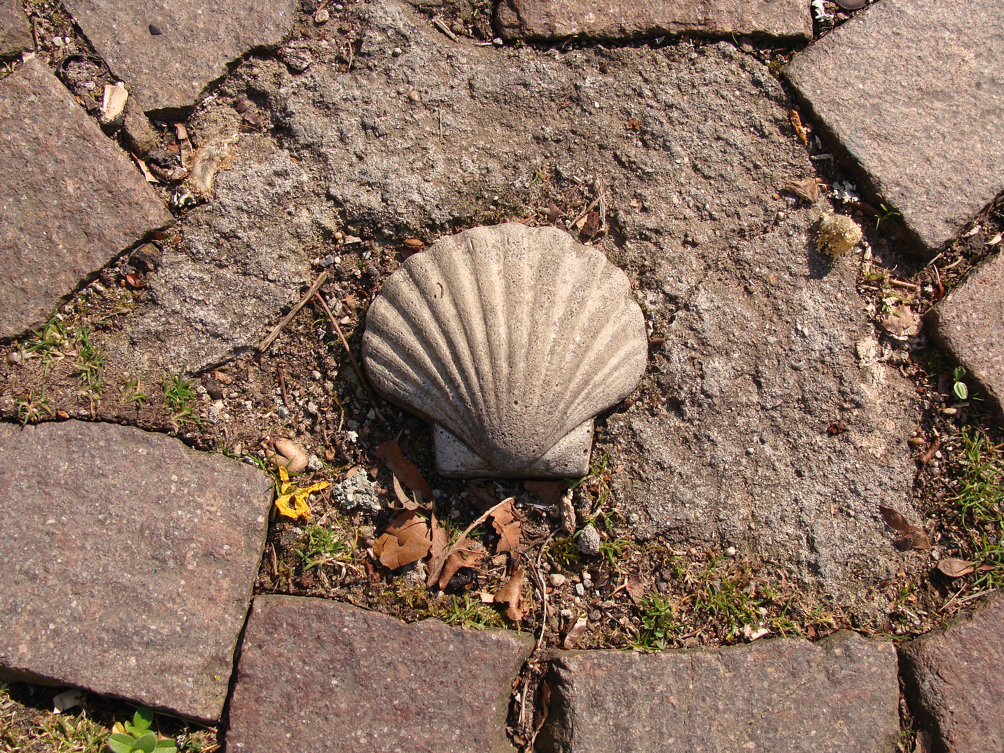 Sculpture d'une coquille Saint Jacques marquant le chemin de Saint-Jacques de Compostelle à la chapelle Sainte-Croix de Forbach (se situe dans les pavés devant l'édifice).